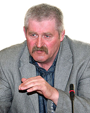 Лисун Д.О.